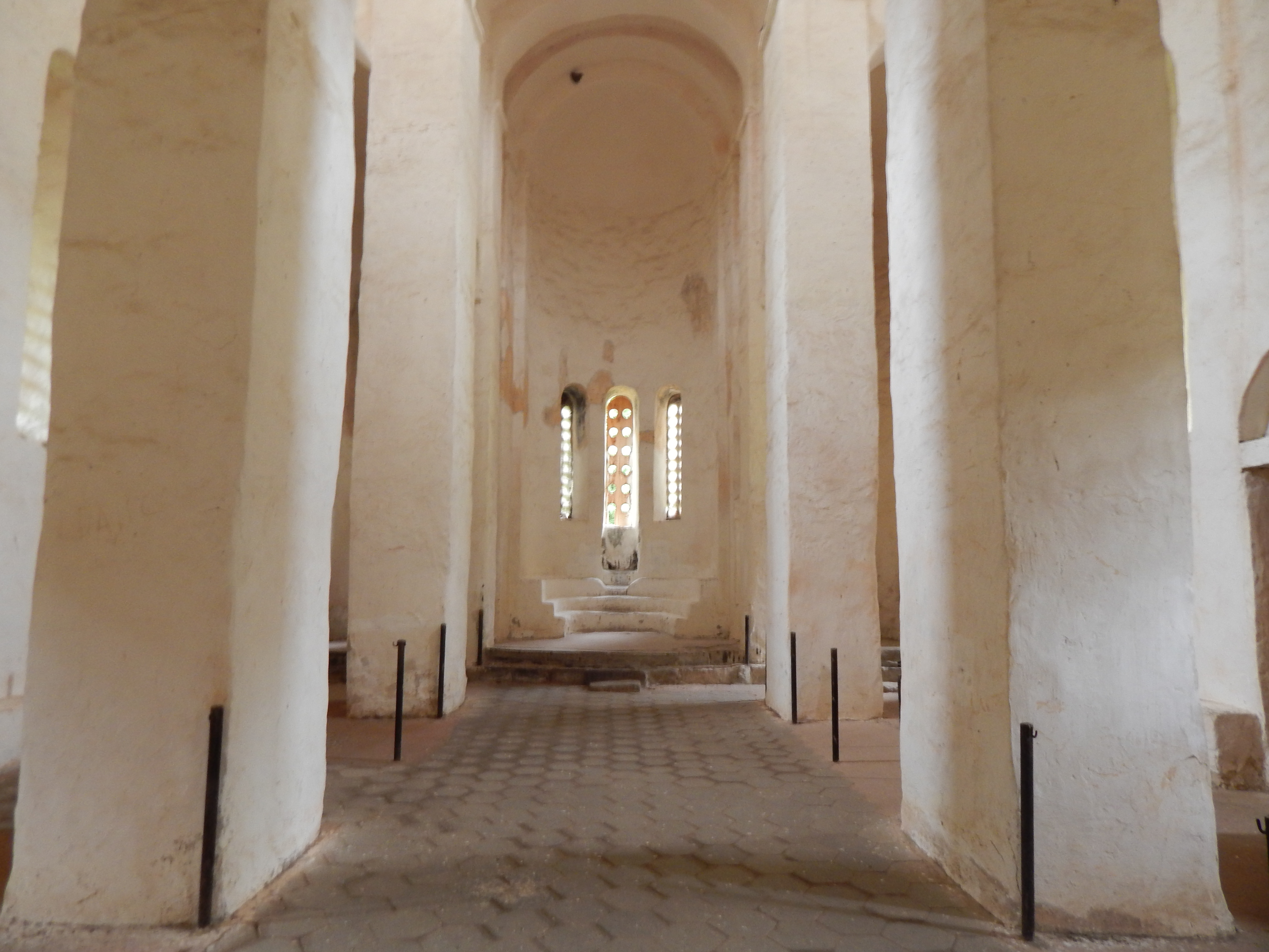 Нижне-Архызское городище. Северный храм. Интерьер